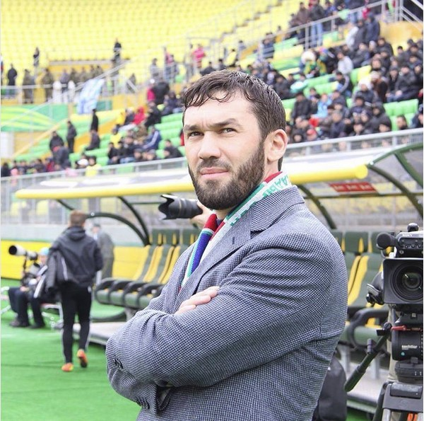 Республика Дагестан, Каспийск, стадион "Анжи-Арена". Президент "Терека" Магомед Даудов побывал на выездной игре грозненцев с "Зенитом" This file, which was originally posted to was reviewed on 1 June 2017 by the administrator or reviewer Daphne Lantier, who confirmed that it was available there under the stated license on that date.